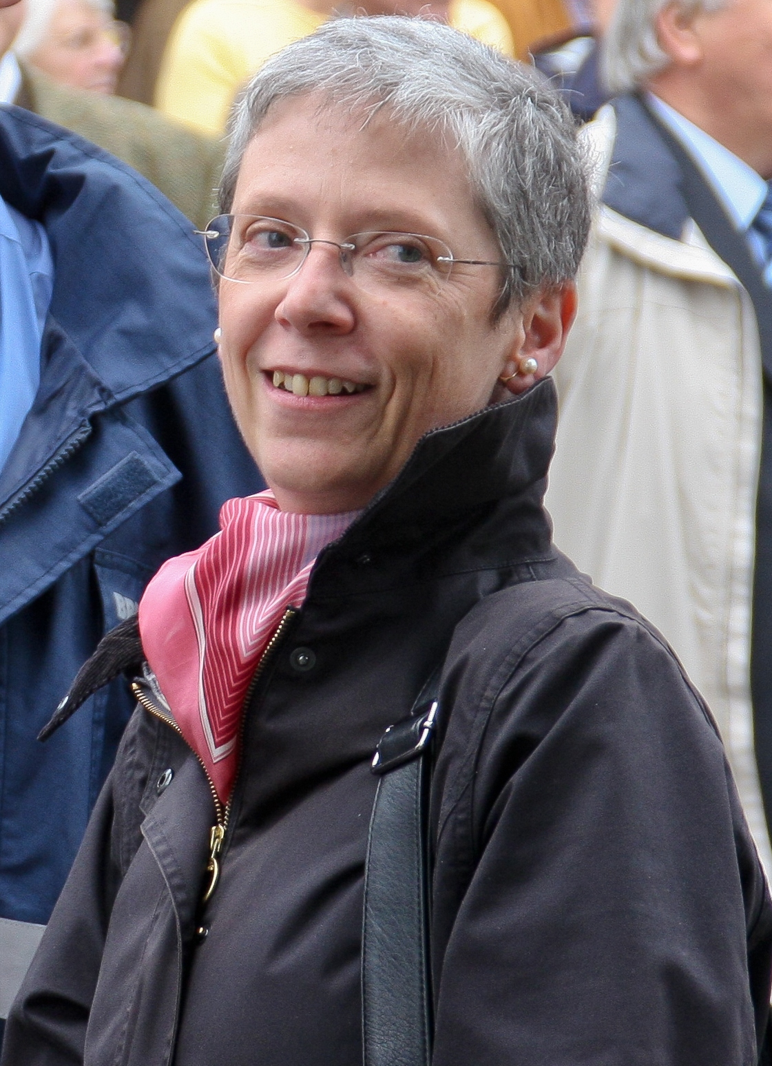 Aufstellung des Friedrich Wilhelm III.-Reiterstandbildes auf seinen Sockel auf dem Kölner Heumarkt, nachdem Reparaturen zur Standsicherheit notwendig geworden waren. Foto: Denkmalkonservatorin Renate Kaymer